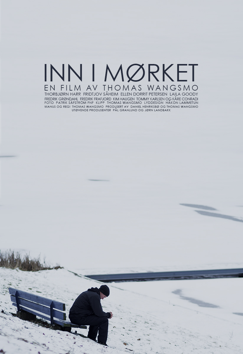 Den internasjonale filmplakaten for Inn i mørket